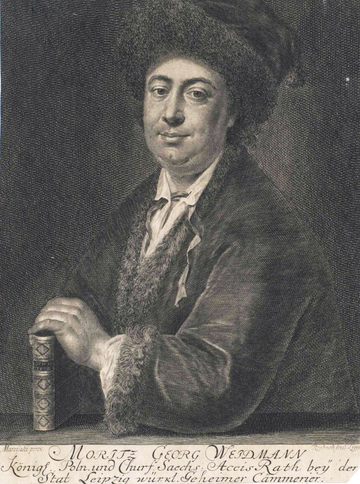 Moritz Georg Weidmann (1686–1743), Stich von Johann Friedrich Rosbach nach Adám Manyoki